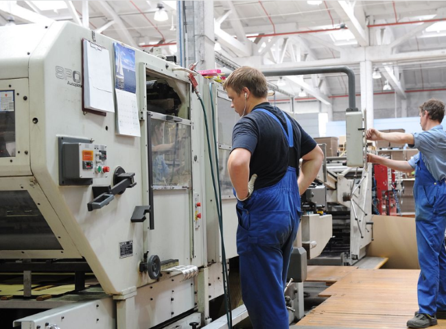 производстве картонной продукции